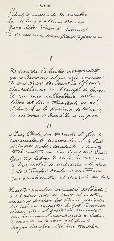 Primera página del manuscrito de la canción nacional de Chile, con las modificaciones definitivas del año 1904, escrito de puño y mano por Eusebio Lillo y depositado en esa época en los archivos del Ministerio de Educación